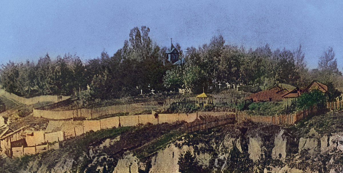 Беларуская (тарашкевіца): Мазыр (Mazyr), Замкавая гара (Zamkavaja hara), або Спаская гара (Spaskaja hara)